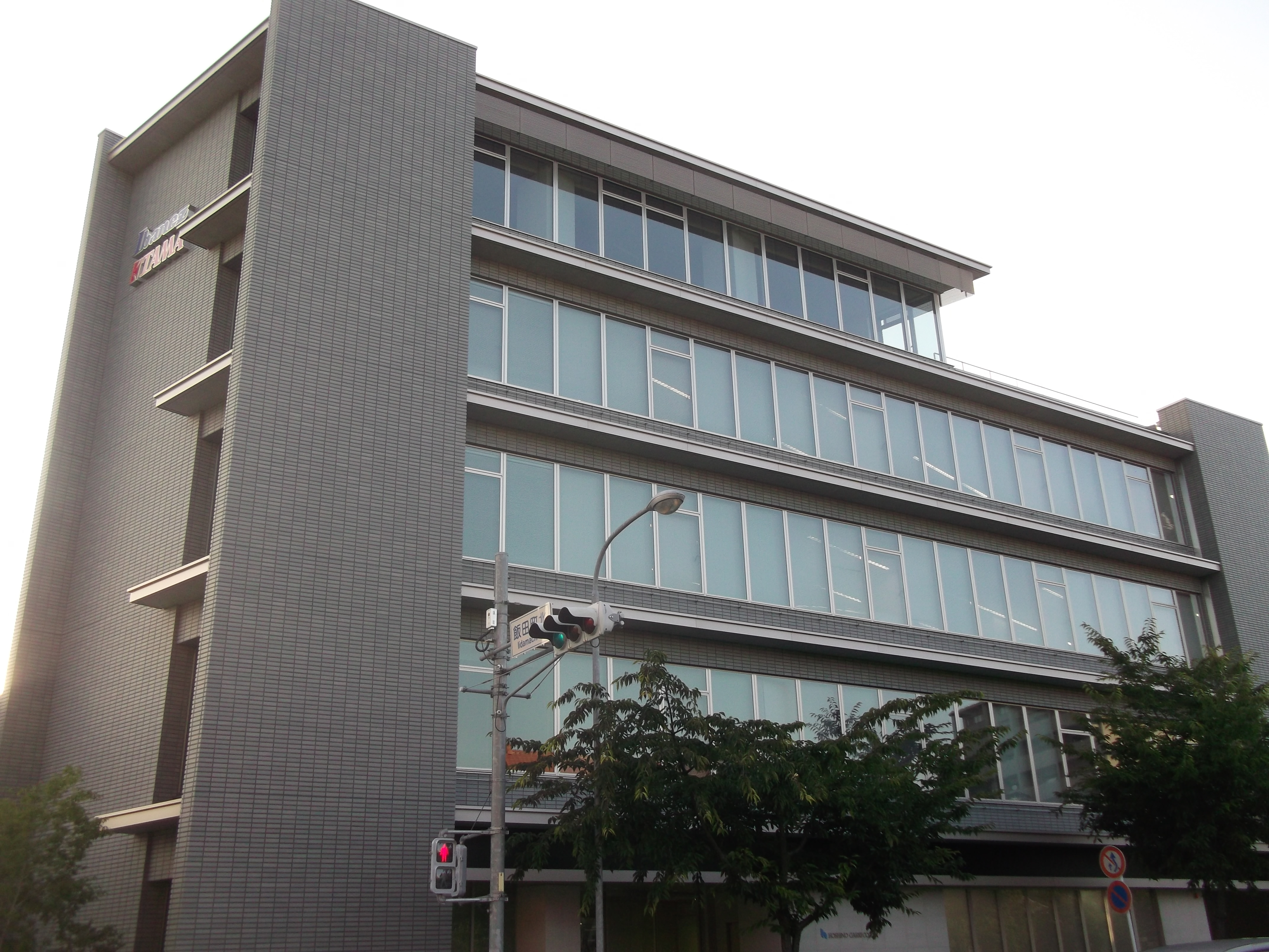 名古屋市東区橦木町の星野楽器本社を東側公道南側より撮影